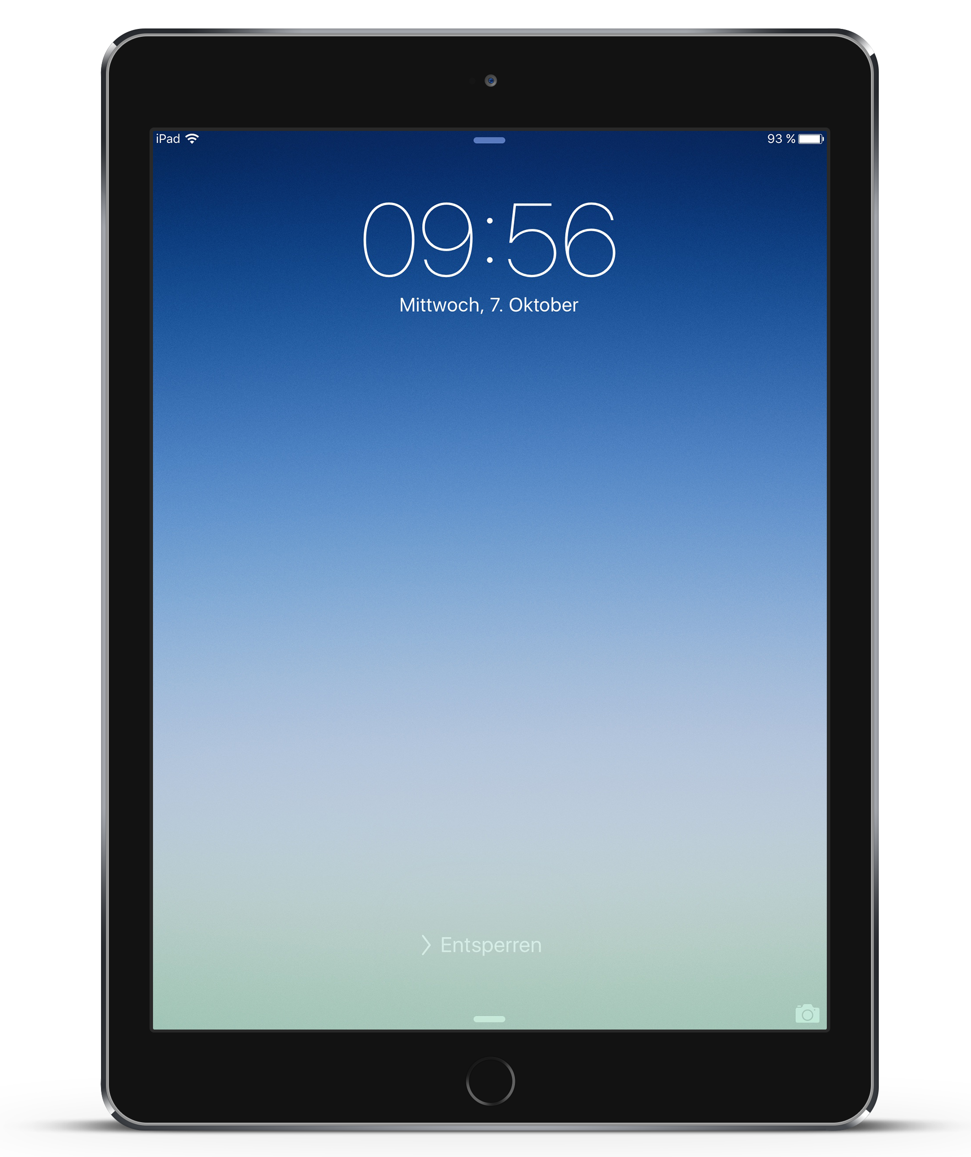 iPad Air 2